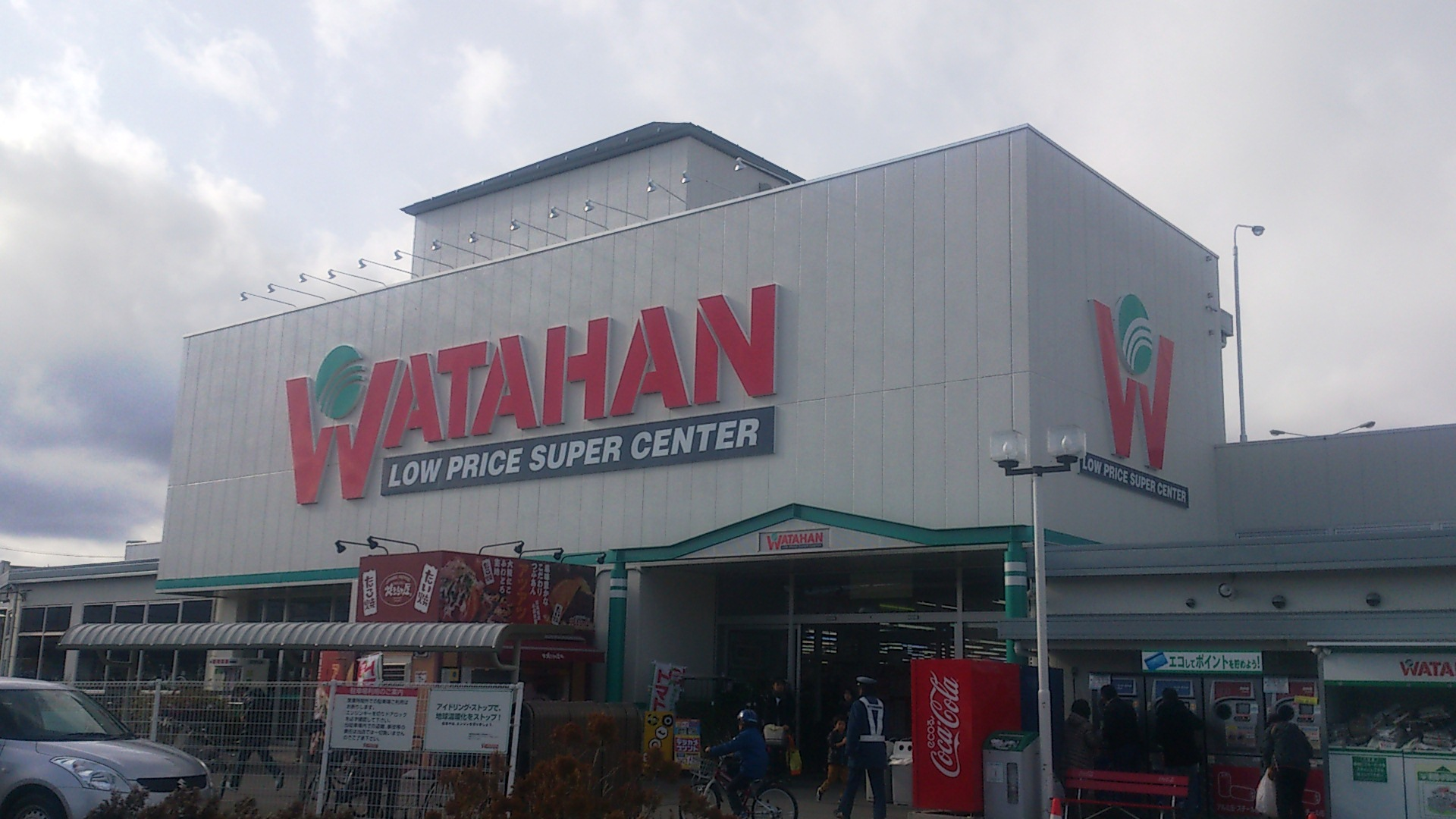 綿半ホームエイド長池店（長野県長野市南長池）